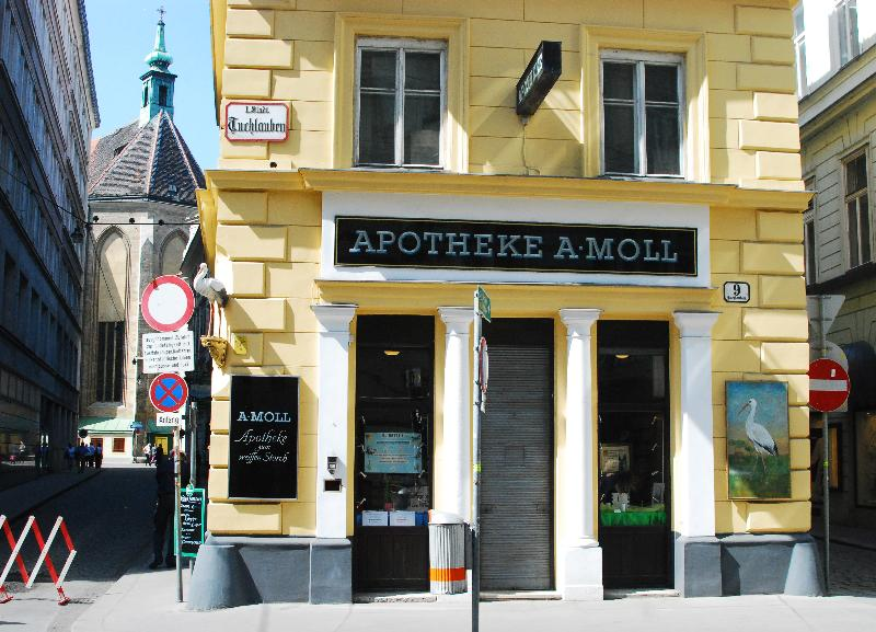 Apotheke zum weißen Storch (A. Moll) im 1. Wiener Gemeindebezirk